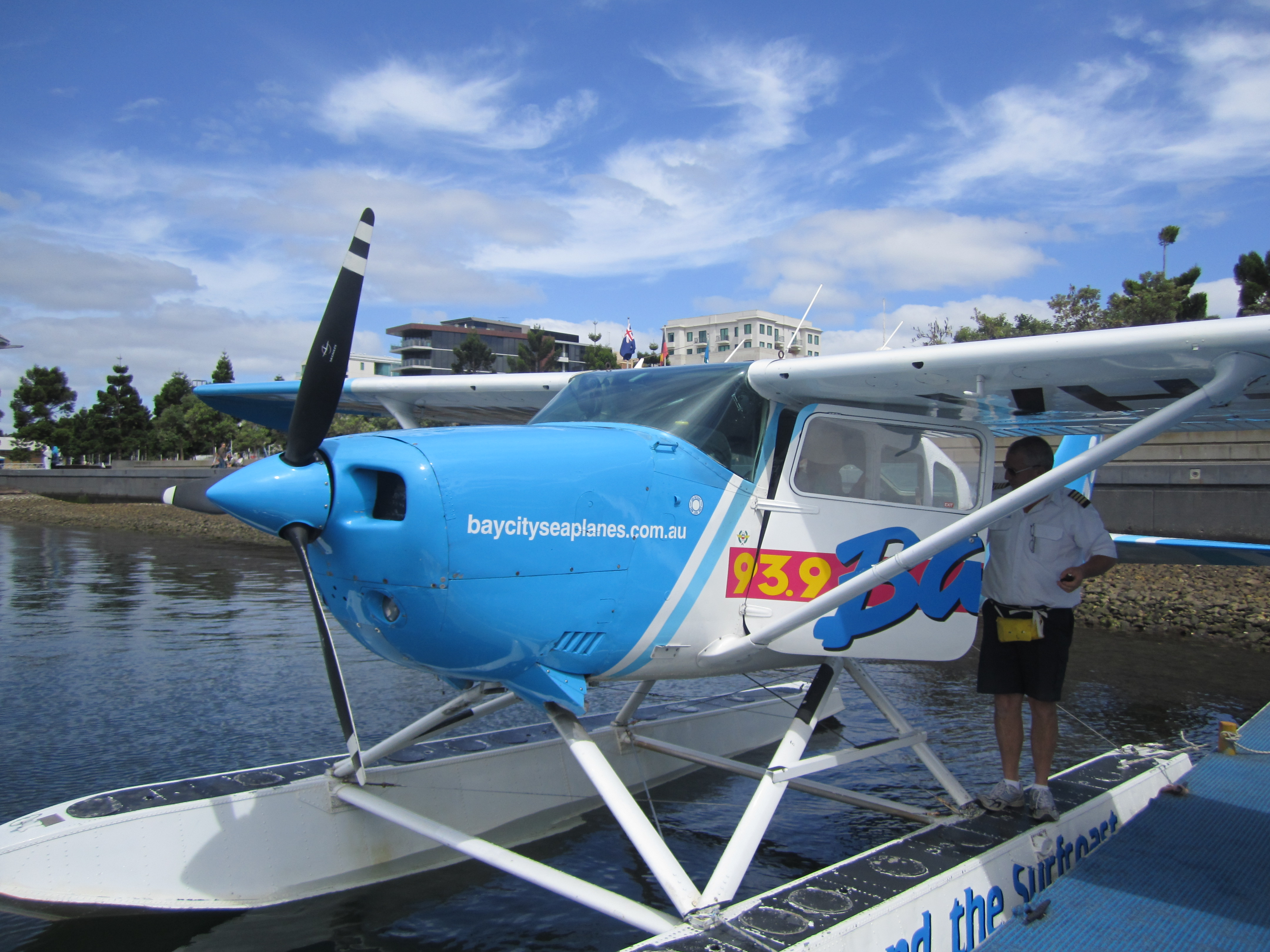 सेस्ना जातीचे पाण्यावर उतरणारे विमान. ऑस्ट्रेलियातील जीलाँग येथे किनार्‍यावर असतांनाचे चित्र